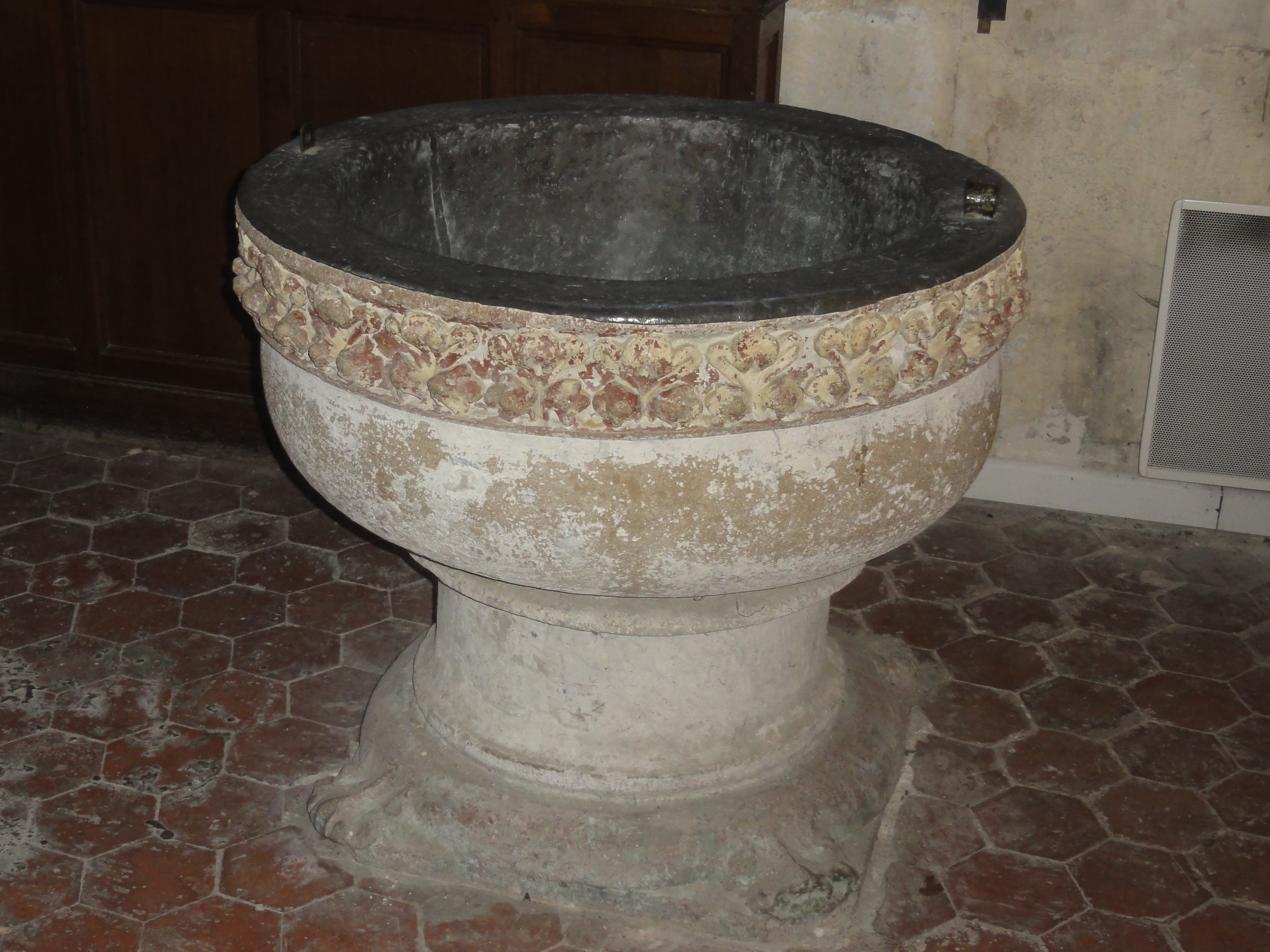 Fonts baptismaux.